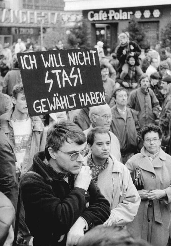 ADN- Oberst 29.3.90-Berlin: Anti-Stasidemonstration "Keine Stasi-Fraktion in der Volkskammer" forderten Tausende Berliner auf einer am Wahlbündnis 90 und Grüner Partei initierten Demo vom Alexanderplatz zum Palast der Republik. Die Demonstranten setzten sich für die Überprüfung aller Abgeordneten, Staatsanwälte und Richter auf eine mögliche Tätigkeit für das ehemalige Ministerium für Staatssicherheit ein.